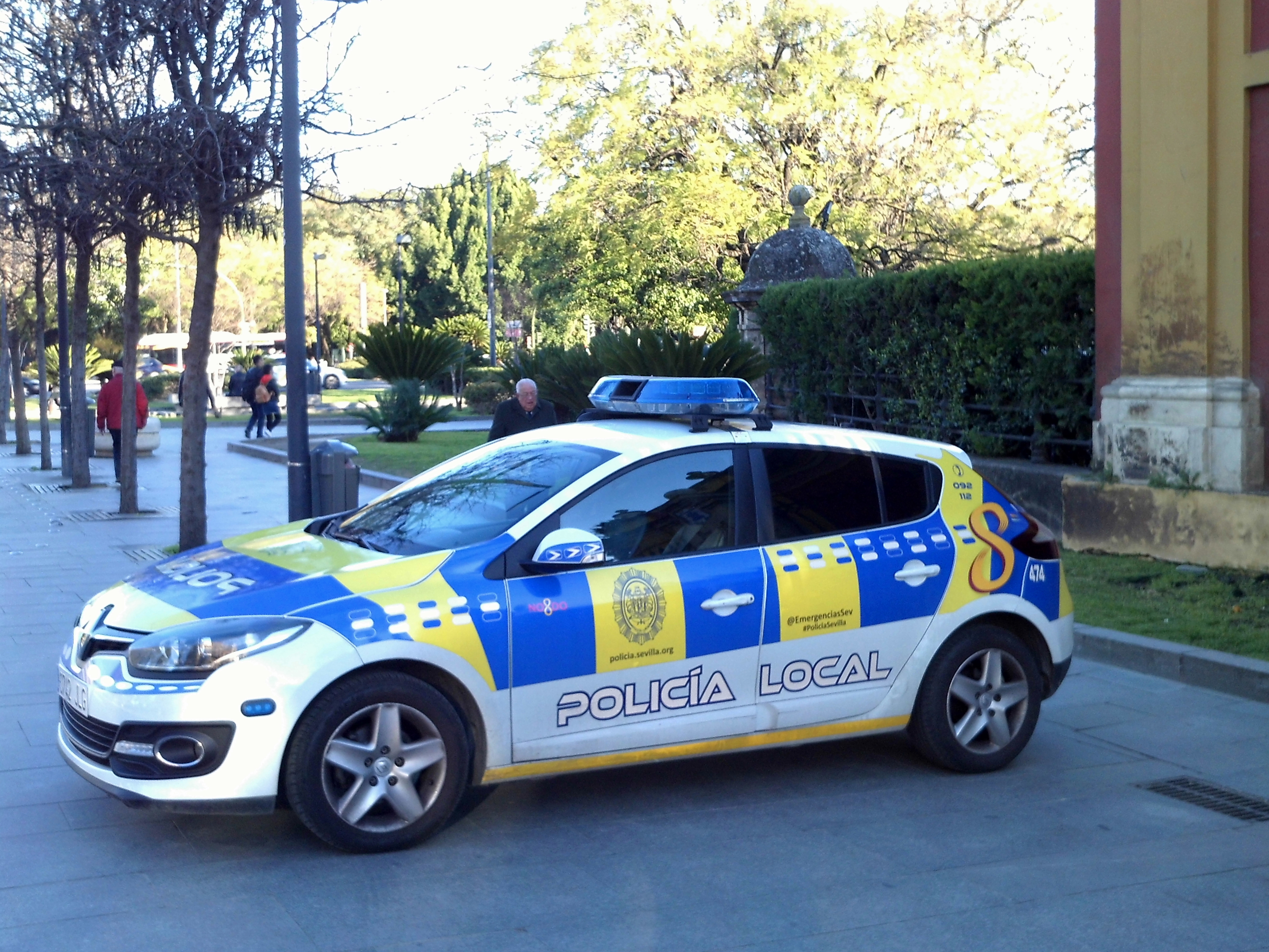 Coche de la Policía Local de Sevilla. Andalucía, España.